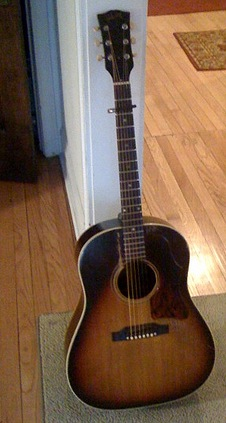 1967 Gibson J-45 Model Guitar